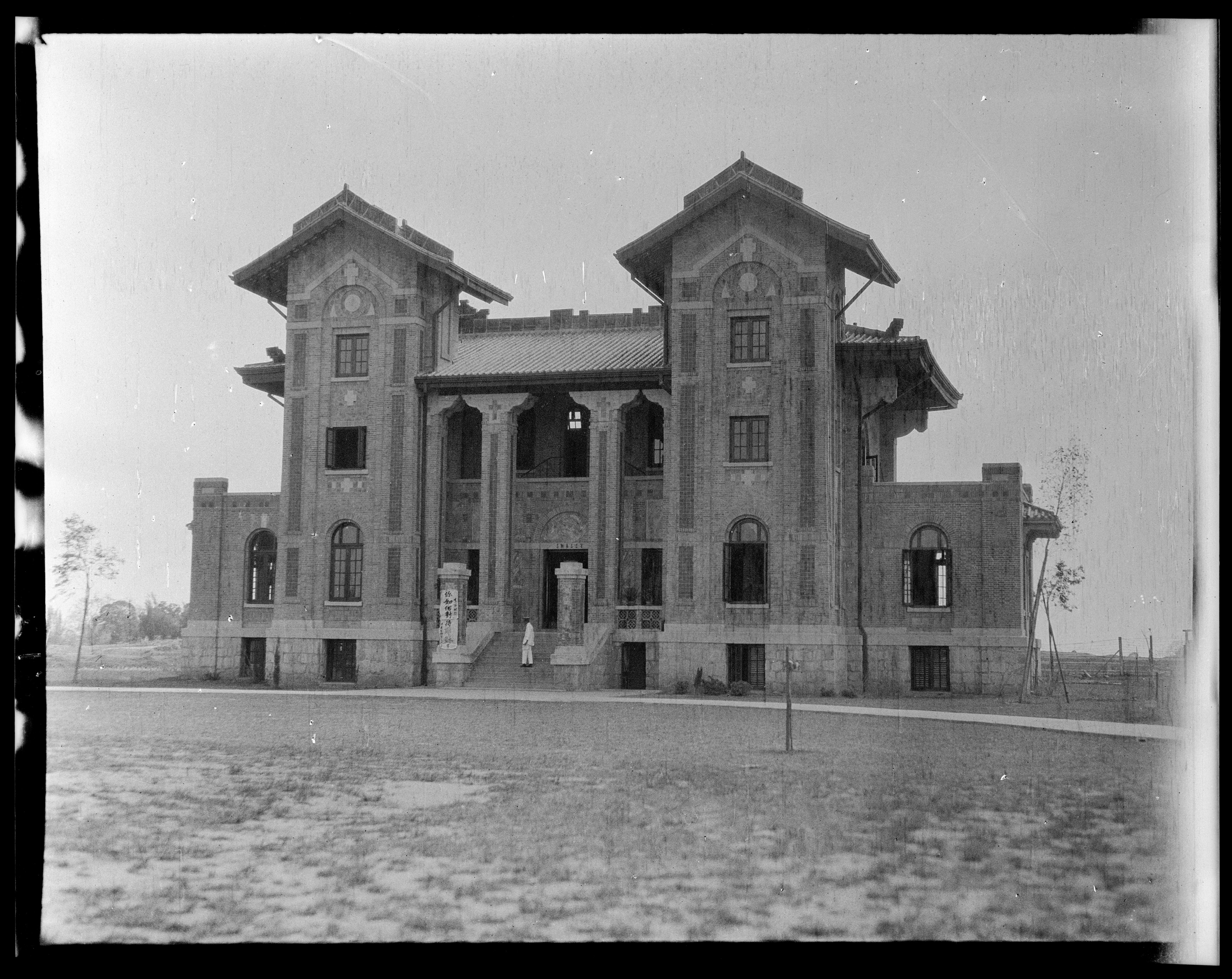 廣州私立嶺南大學懷士堂